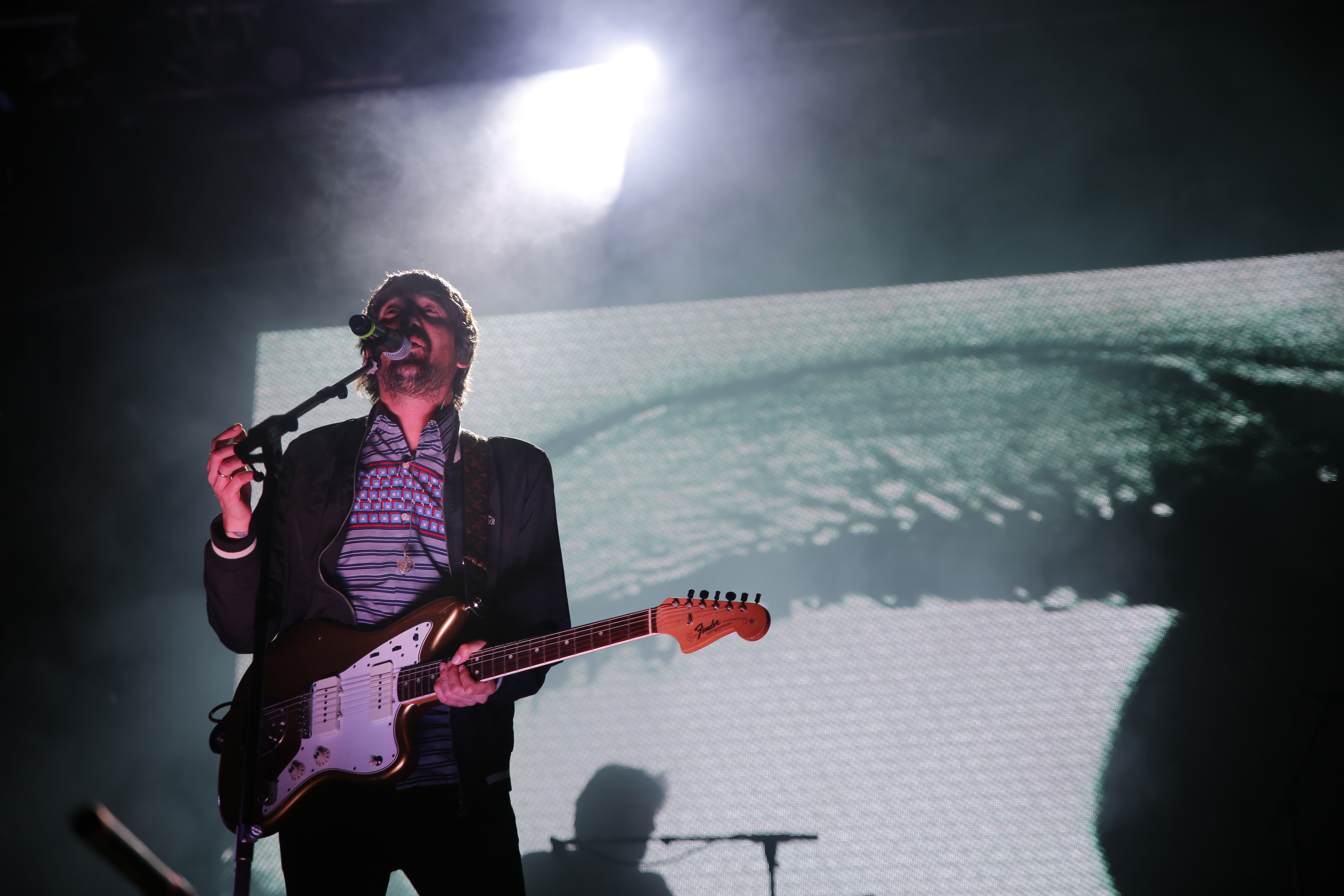 El grupo Lori Meyers en el festival Palencia Sonora 2018. Antonio López (Noni), voz y guitarra.